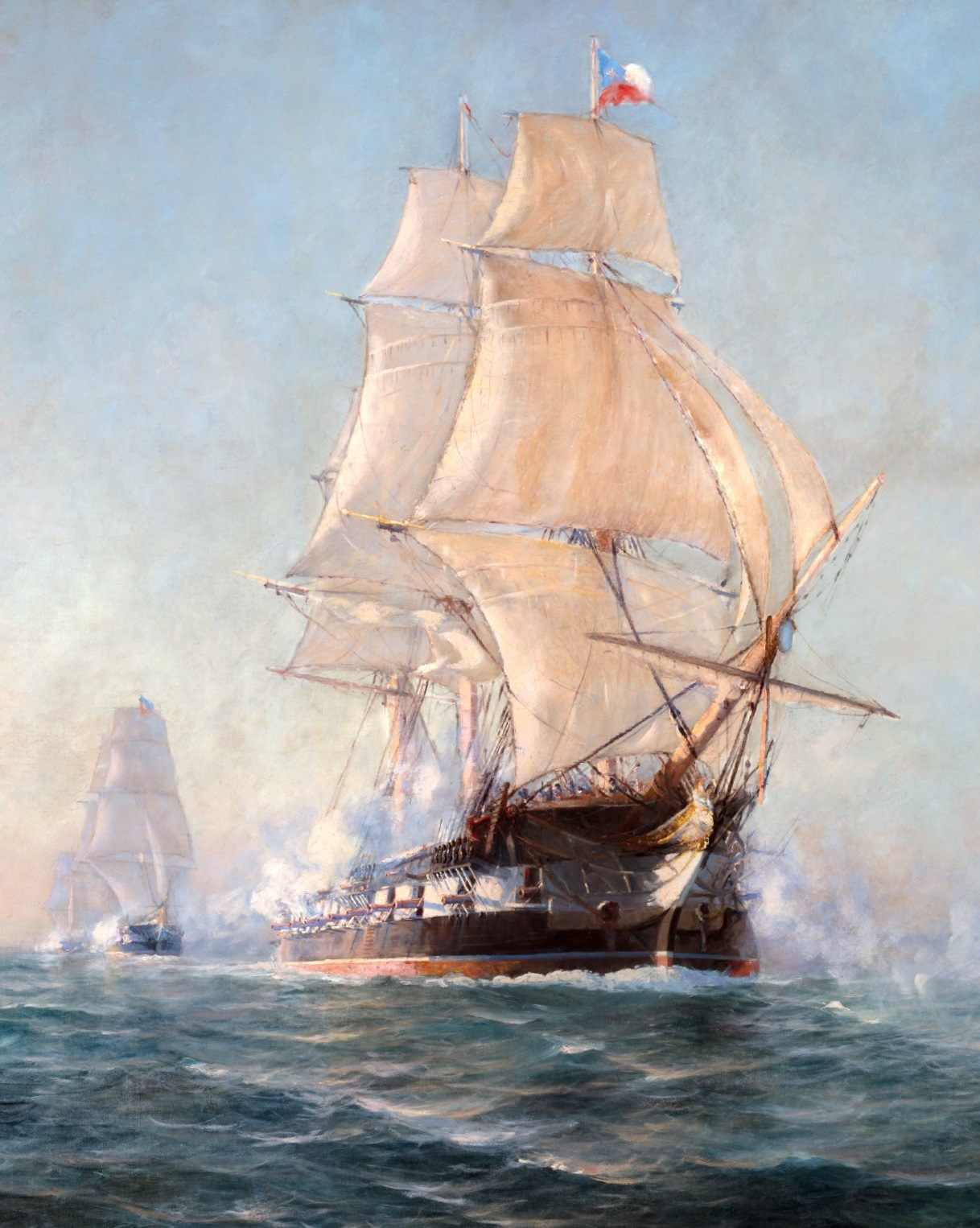 Esta tela muestra a tres de los buques que componían dicha fuerza naval, realizando salvas de saludo el día del zarpe rumbo a su primera misión, 9 de octubre de 1818. Al centro se aprecia la fragata Lautaro; a babor de ésta, hacia la derecha de la imagen, el navío San Martín (insignia del comodoro Manuel Blanco Encalada), y en un segundo plano, hacia la izquierda de la obra, la corbeta Chacabuco. No aparece en la escena el bergantín Araucano, que completaba esta fuerza. La primera misión de la misma tuvo el exitoso resultado de la captura de la fragata española María Isabel en Talcahuano, el 28 de octubre, además de varios transportes, durante los días siguientes.